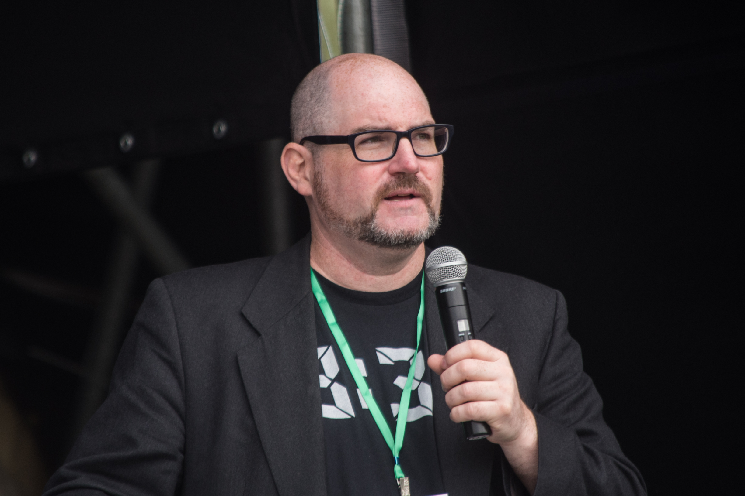 Дэвид Кирби (старший преподаватель Центра истории науки, техники и медицины Университета Манчестера, автор книги «Lab Coats in Hollywood – Science, Scientists, and Cinema») на Geek Picnic 2017 в Санкт-Петербурге